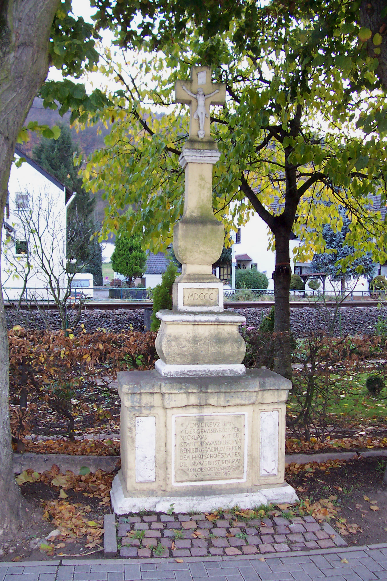 Wasserliesch, Reiniger Kreuz